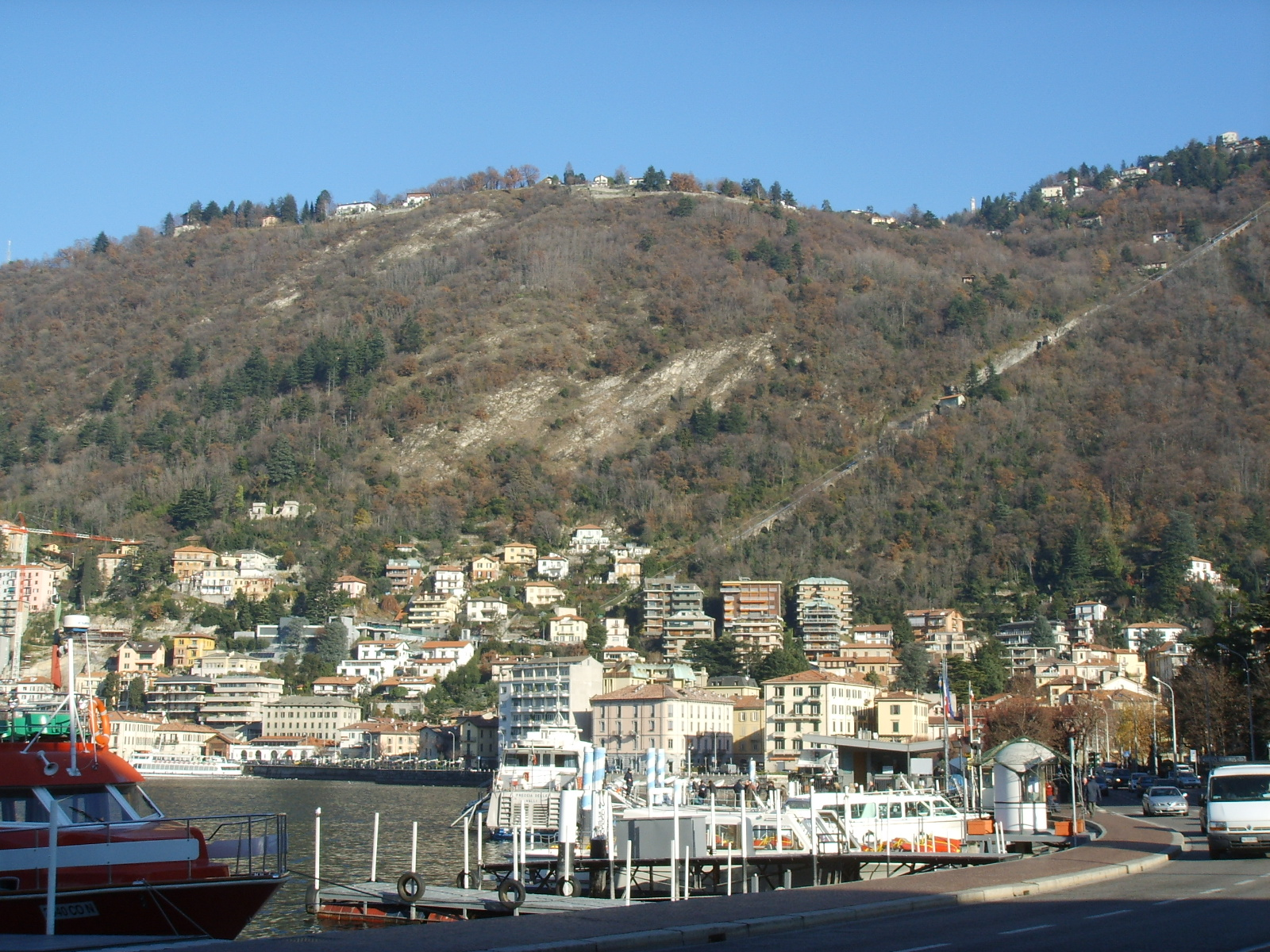 Como